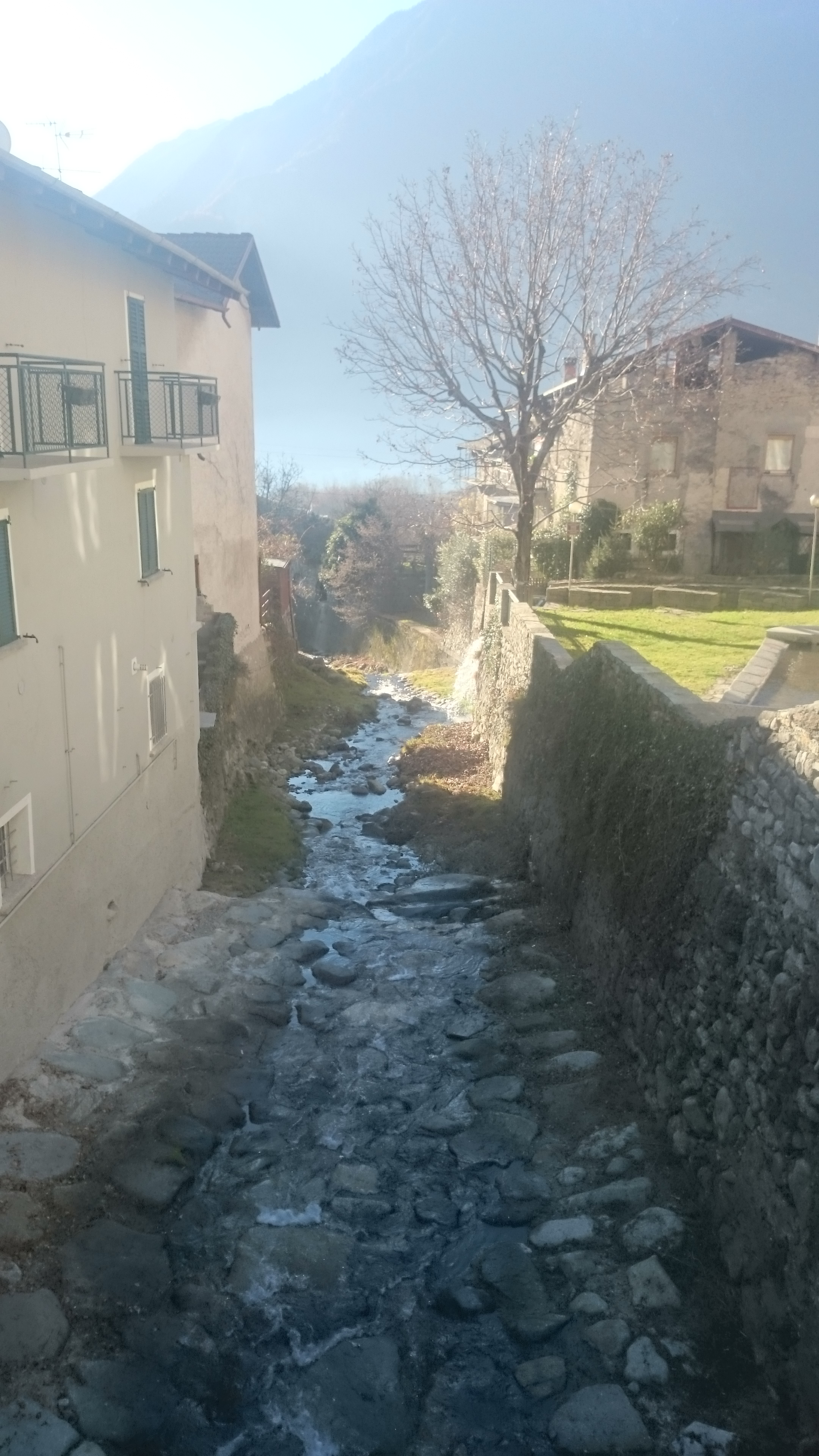 Torrente Finale nel centro abitato di Berbenno di Valtellina